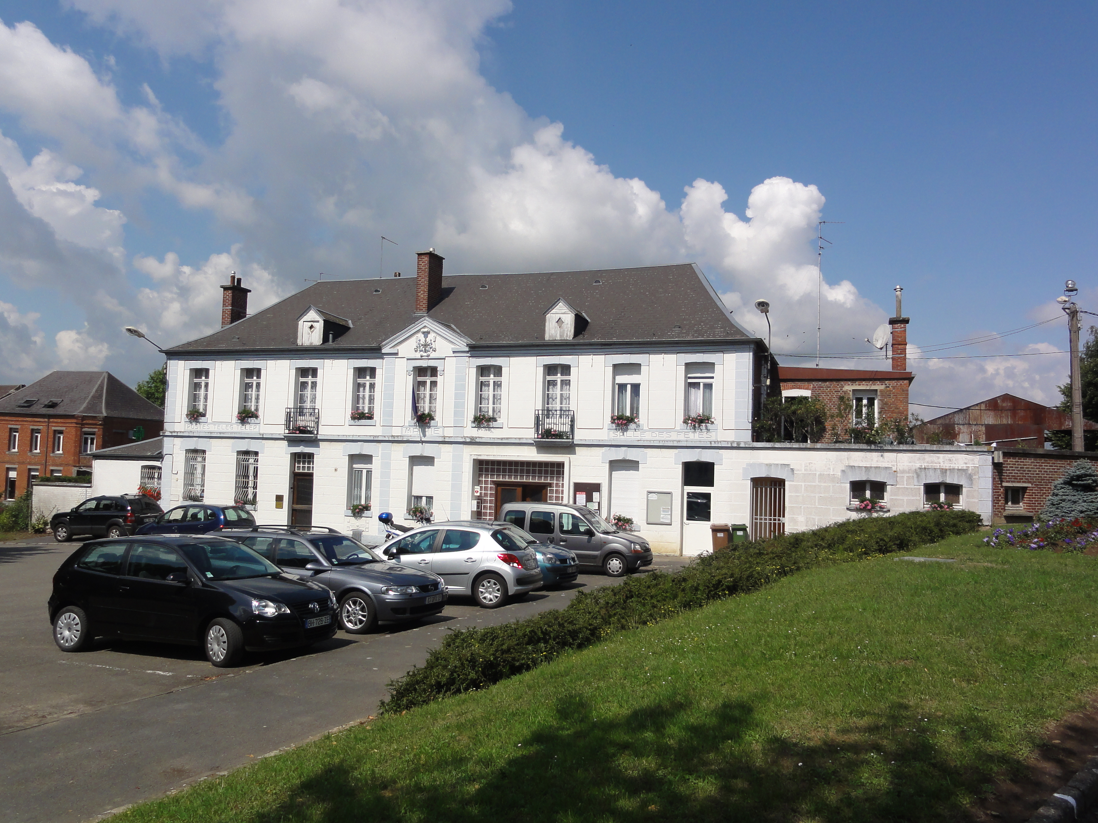 Englefontaine (Nord, Fr) mairie, postes, salle des fêtes